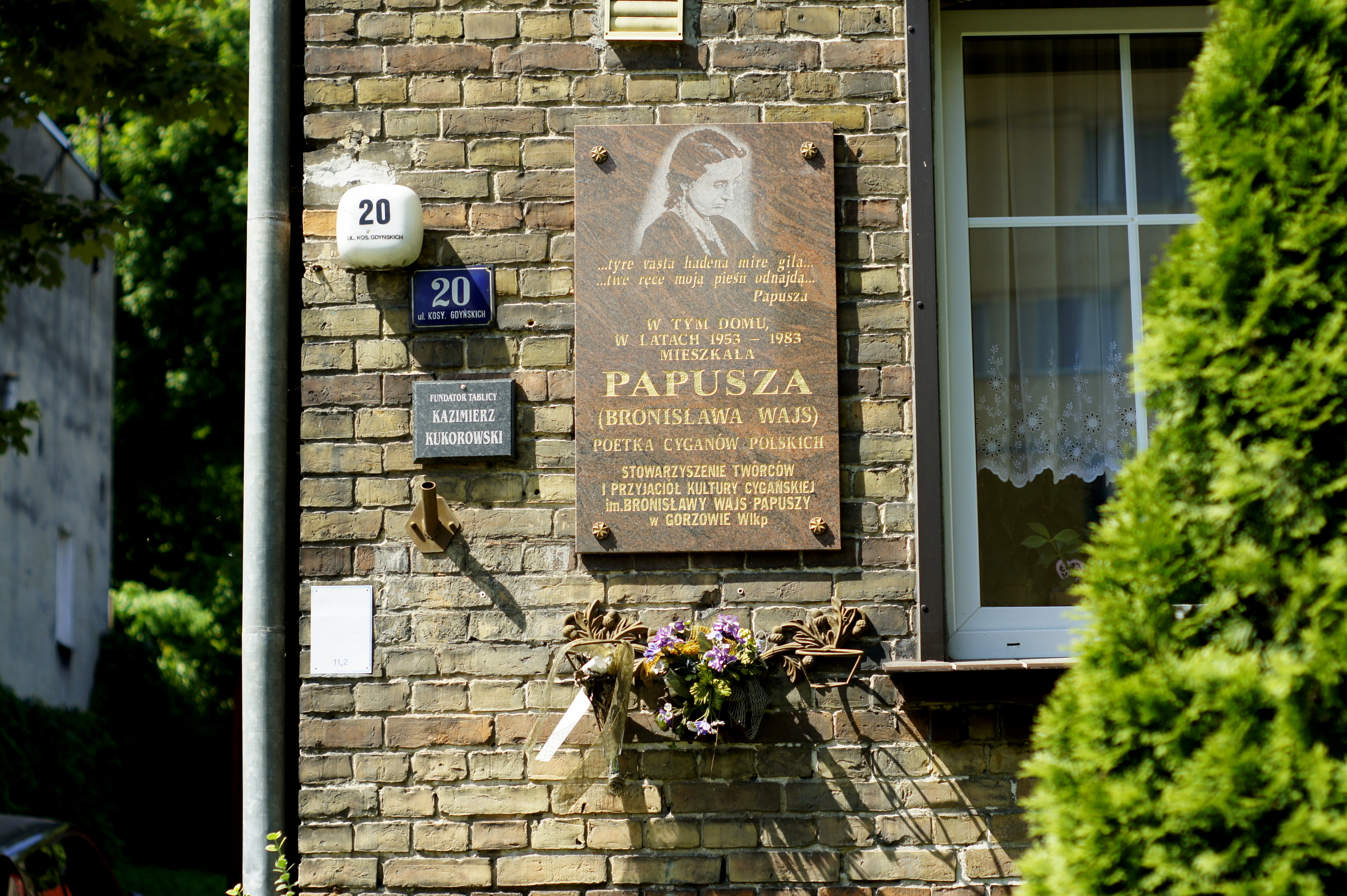 Gorzów Wlkp., ul. Kosynierów Gdyńskich 20. Tablica na domu w którym w latach 1959 - 1983 mieszkała Papusza.(błędnie podano rok zamieszkania 1953 r.)